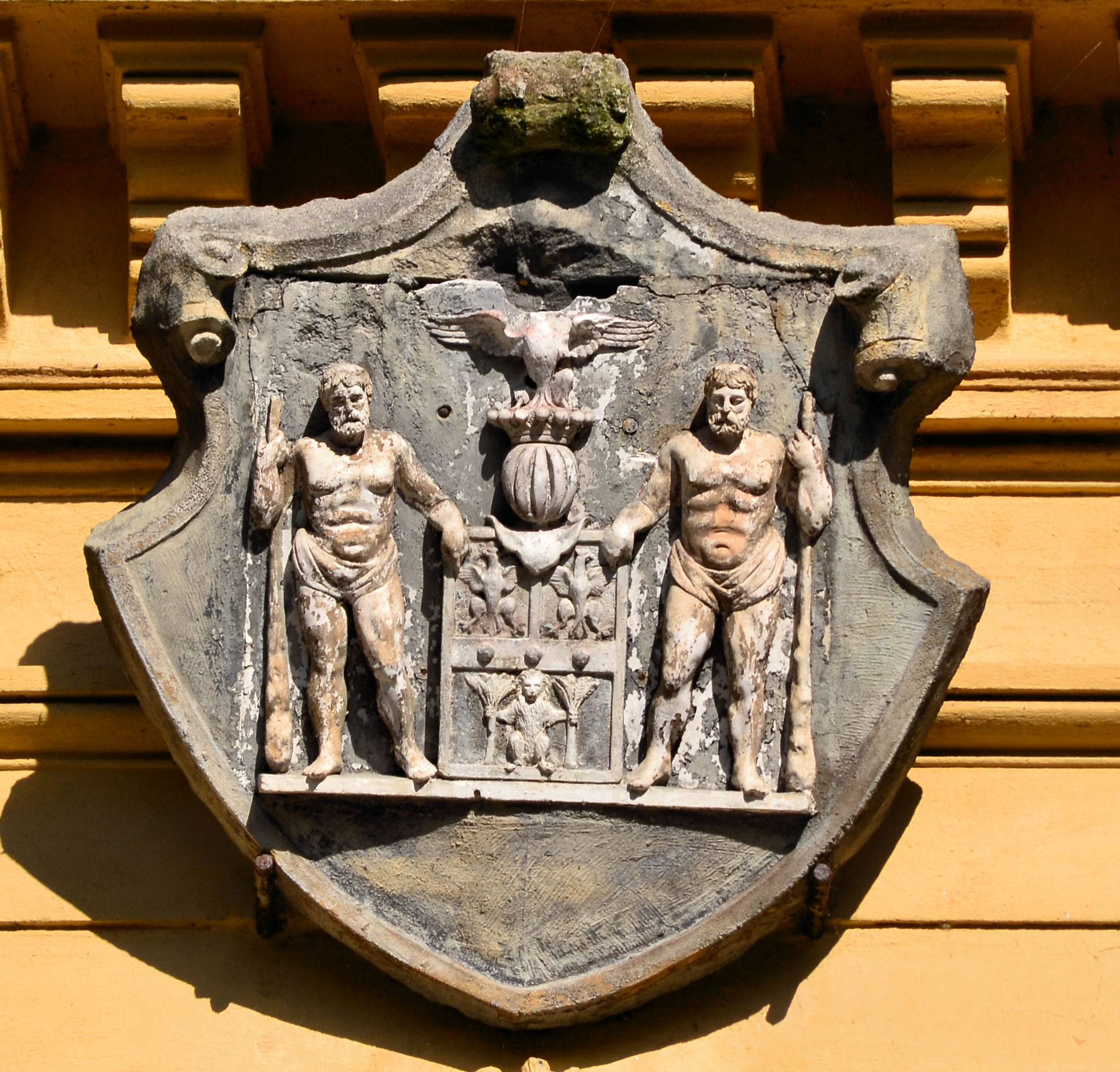 Pałac w Karsznie (Nowe Warpno)